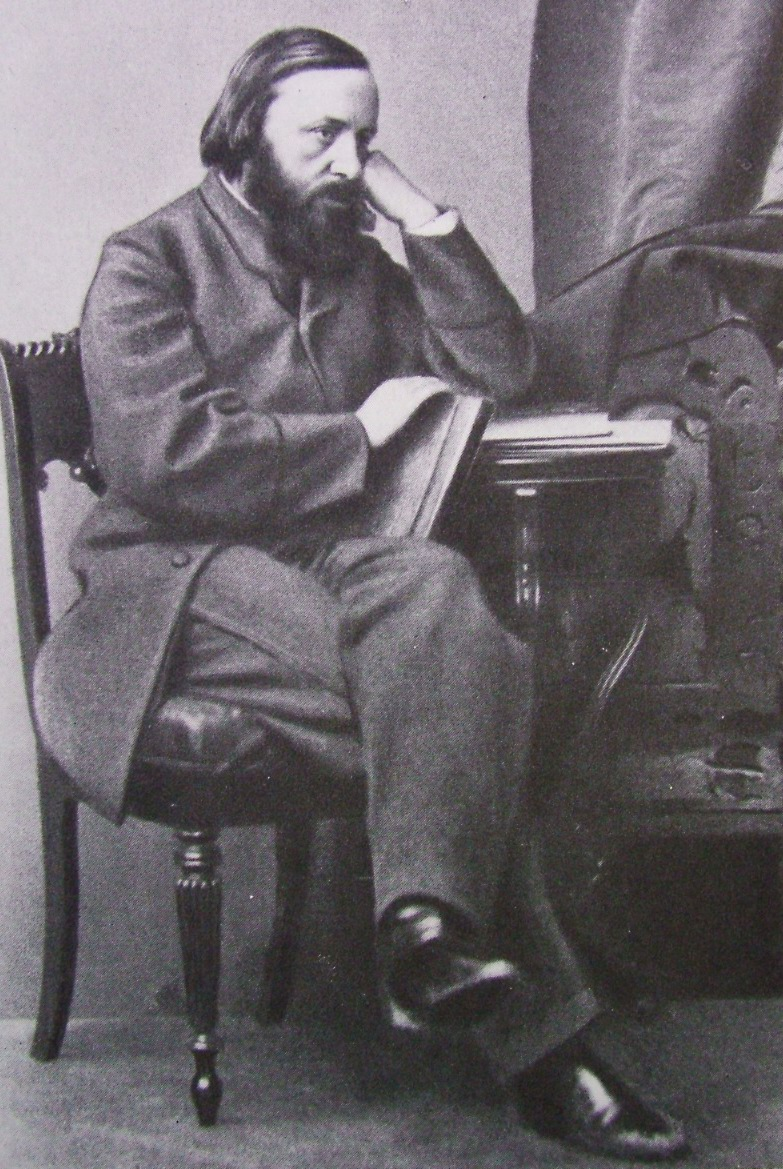 Василий Курочкин (28 июля 1831 — 15 августа 1875), русский поэт-сатирик, основатель и главный редактор газеты "Искра"